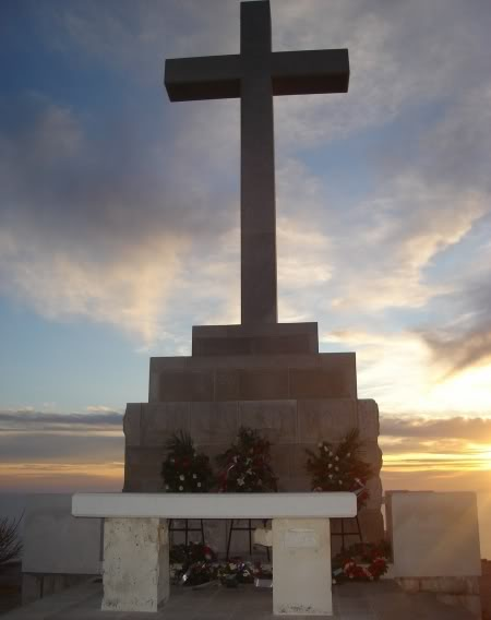 Križ na brdu Srđ iznad Dubrovnika